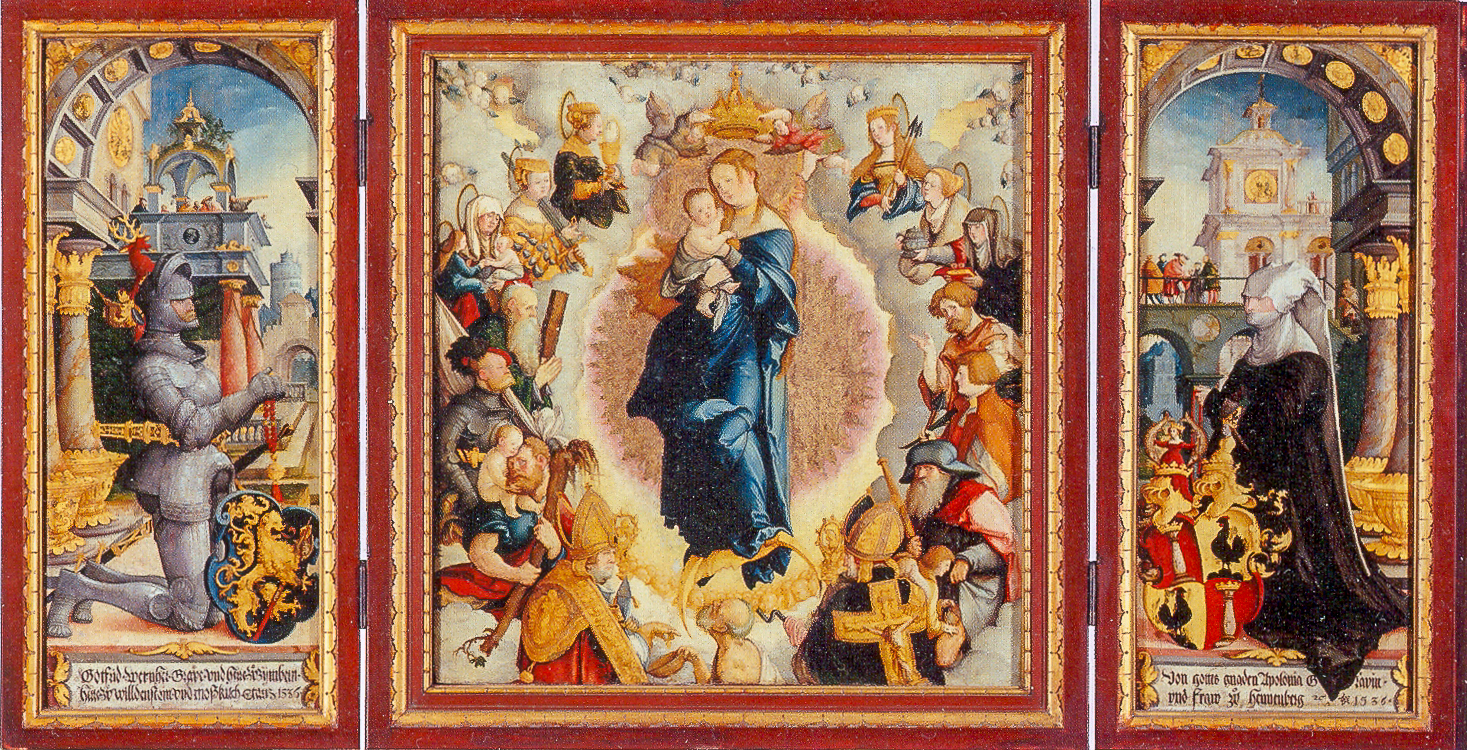 Der Wildensteiner Altar in geöffnetem Zustand